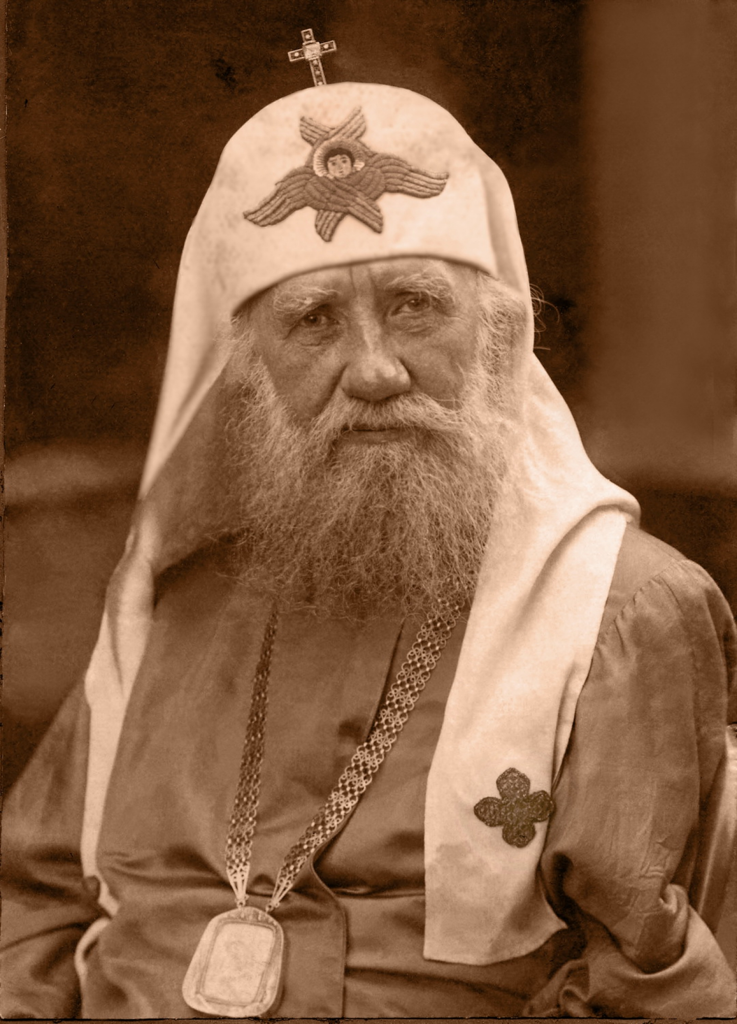 Патриарх Московский и всея России Тихон